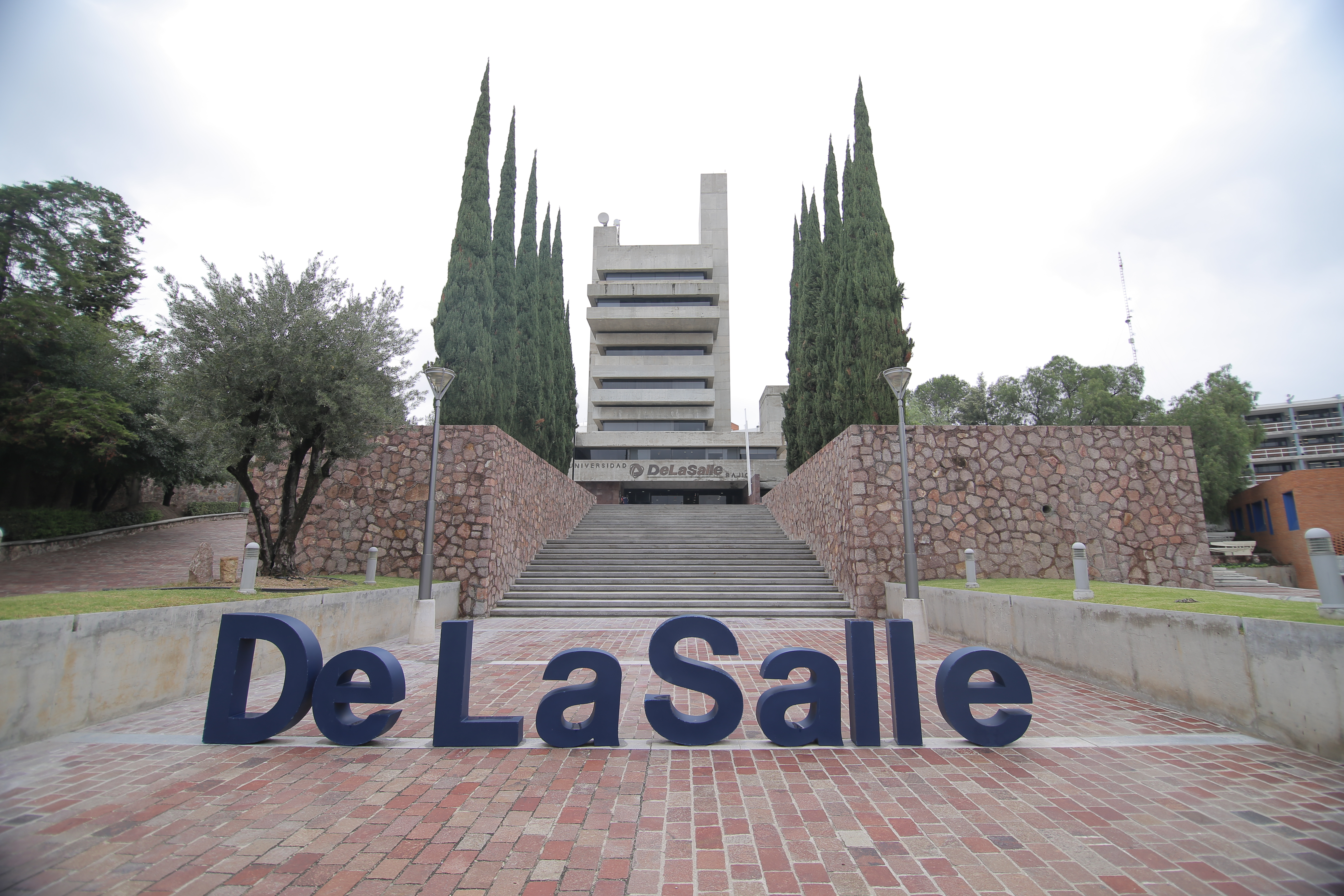 Edificio de rectoria.jpg